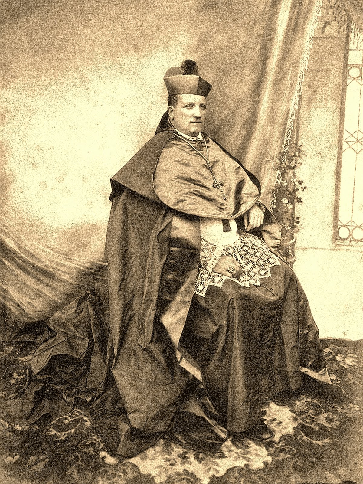 Manuel Lago González (1865-1925)